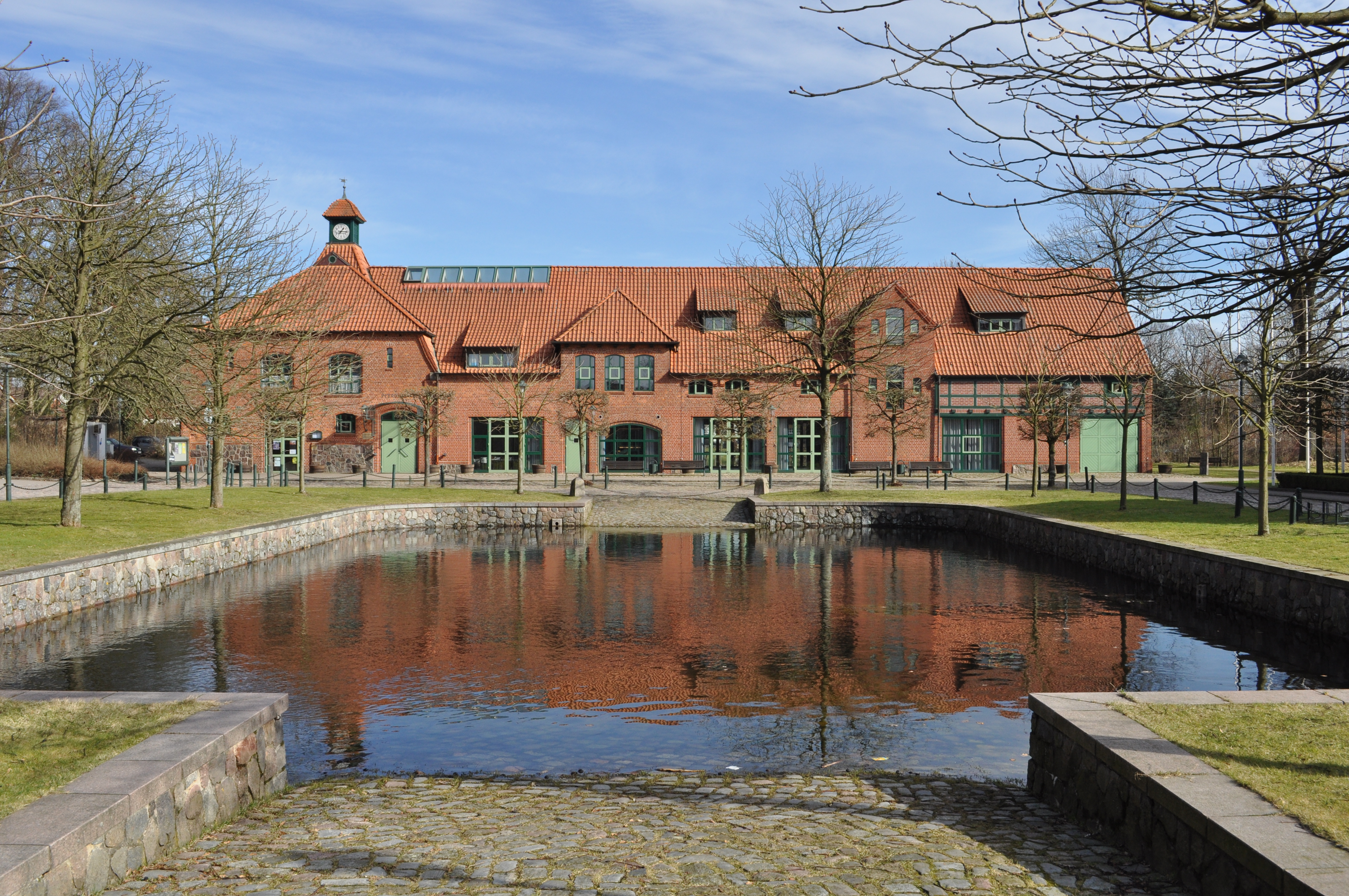 Dorfgemeinschaftshaus Pferdestall in Hoisbüttel (Ammersbek). Im Vordergrund die zugehörige Pferdeschwemme.